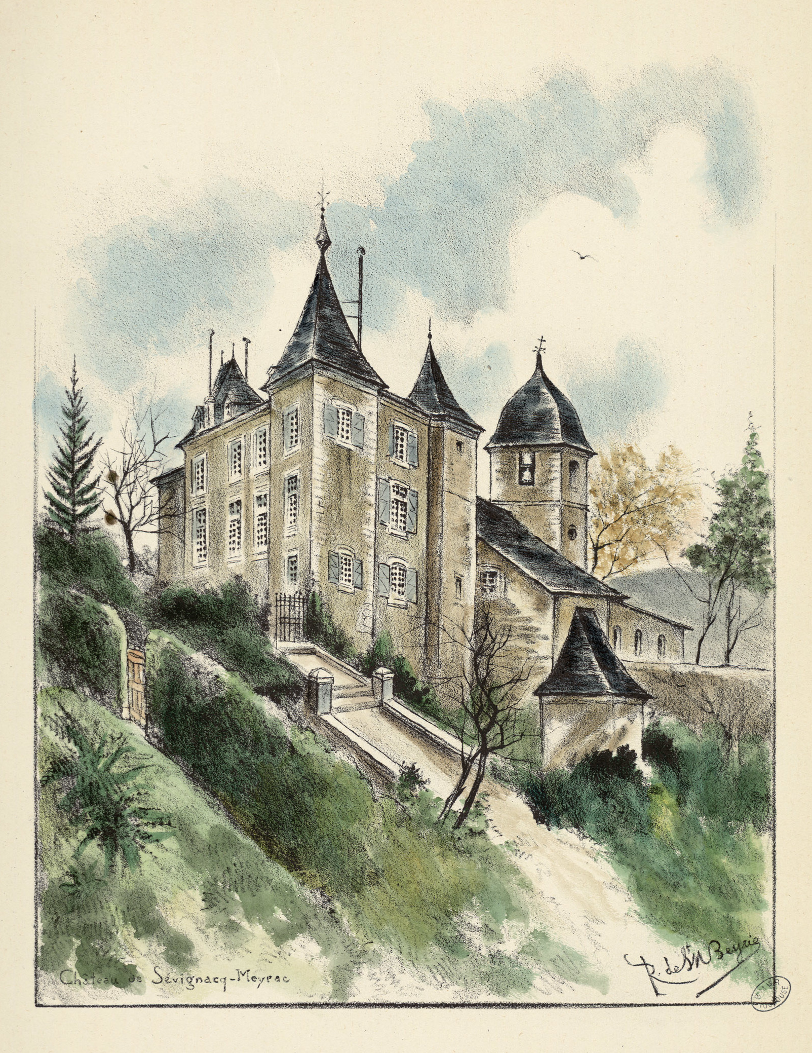 Ancely, René (1876 - 1966). Possesseur